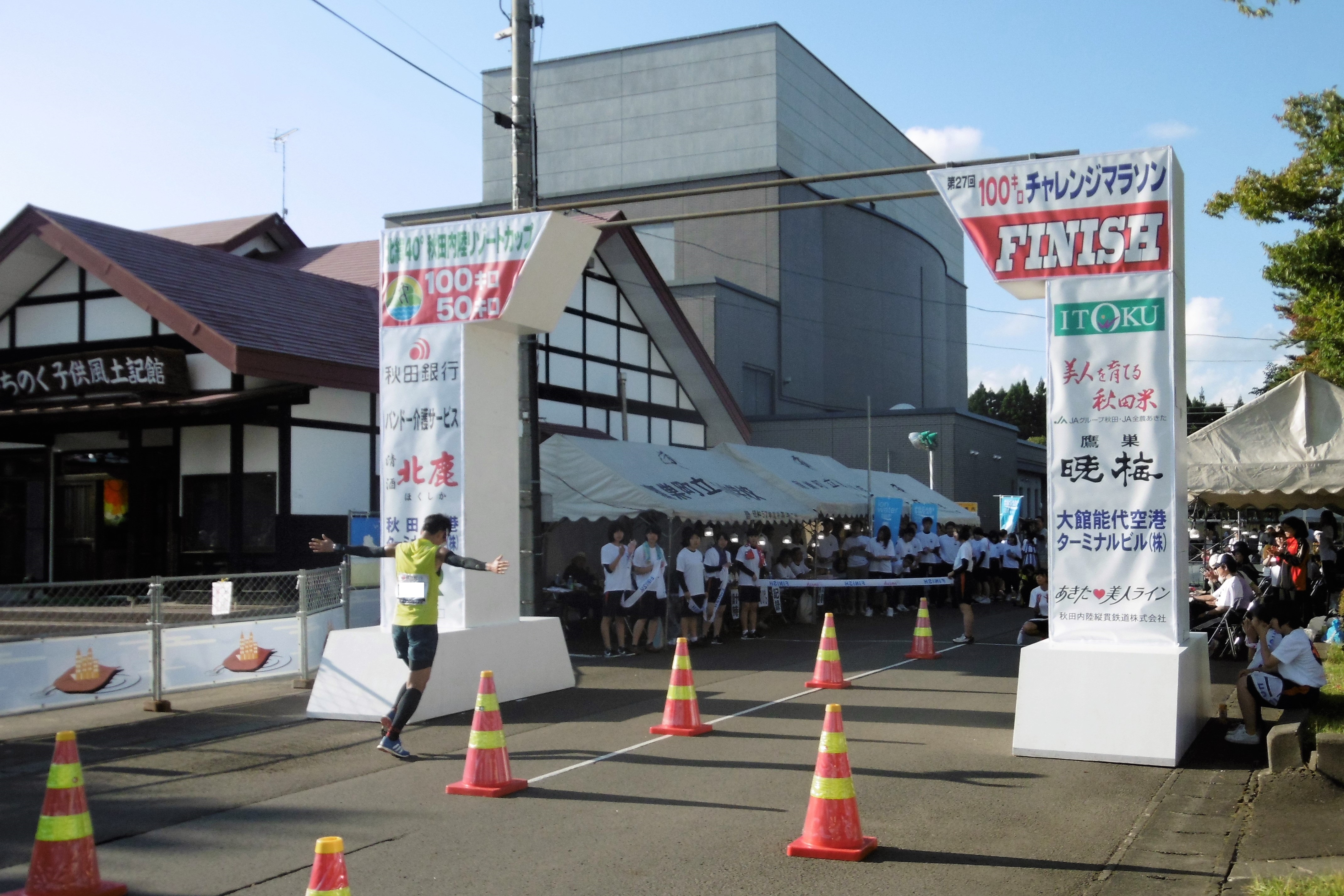 北緯40°秋田内陸リゾートカップ100キロチャレンジマラソン ゴール（秋田県北秋田市）